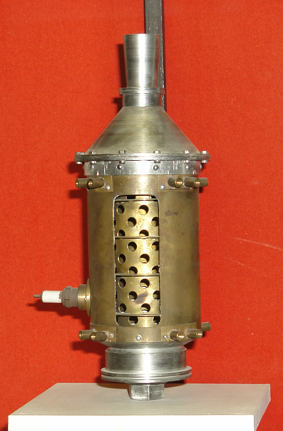 Ракетный двигатель 09. Музей космонавтики и ракетной техники; Санкт-Петербург. This photograph was taken in Museum of Space and Missile Technology (Saint Petersburg) Object location59° 57′ 07″ N, 30° 19′ 16″ E